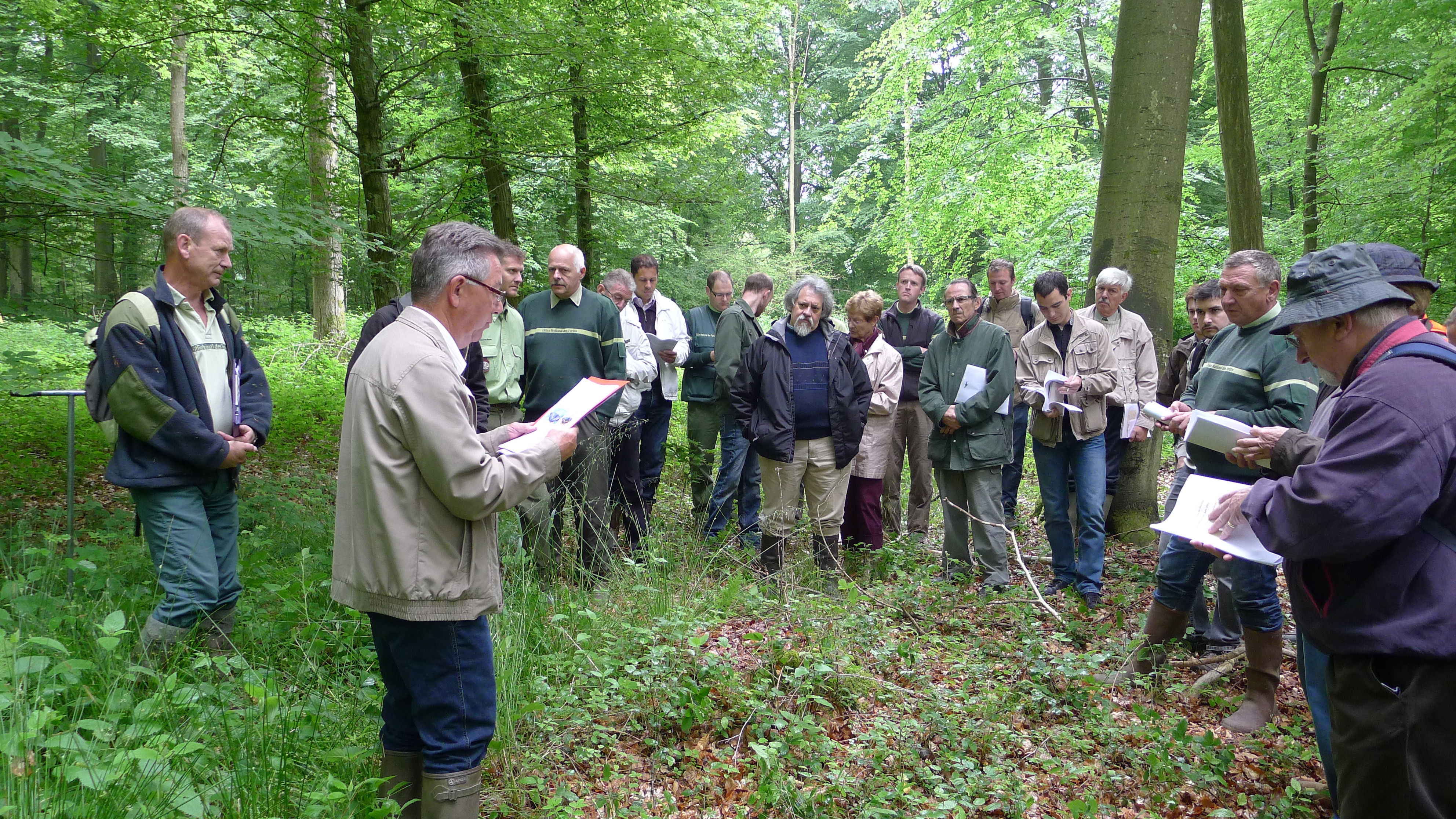 Réunion CSENPC-ONF 2012 forêt de Mormal